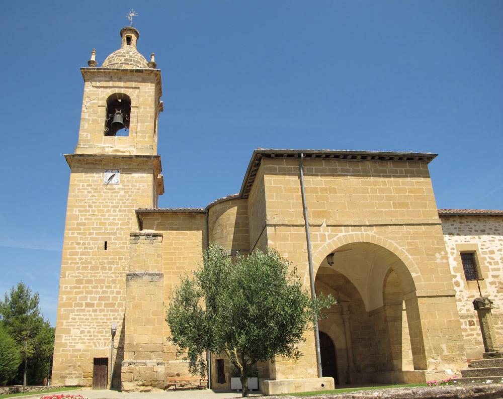 Iglesia de Nuestra Señora del Rosario (Álava) en Rivabellosa (Ribera Baja/Erribera Beitia, Álava, País Vasco).